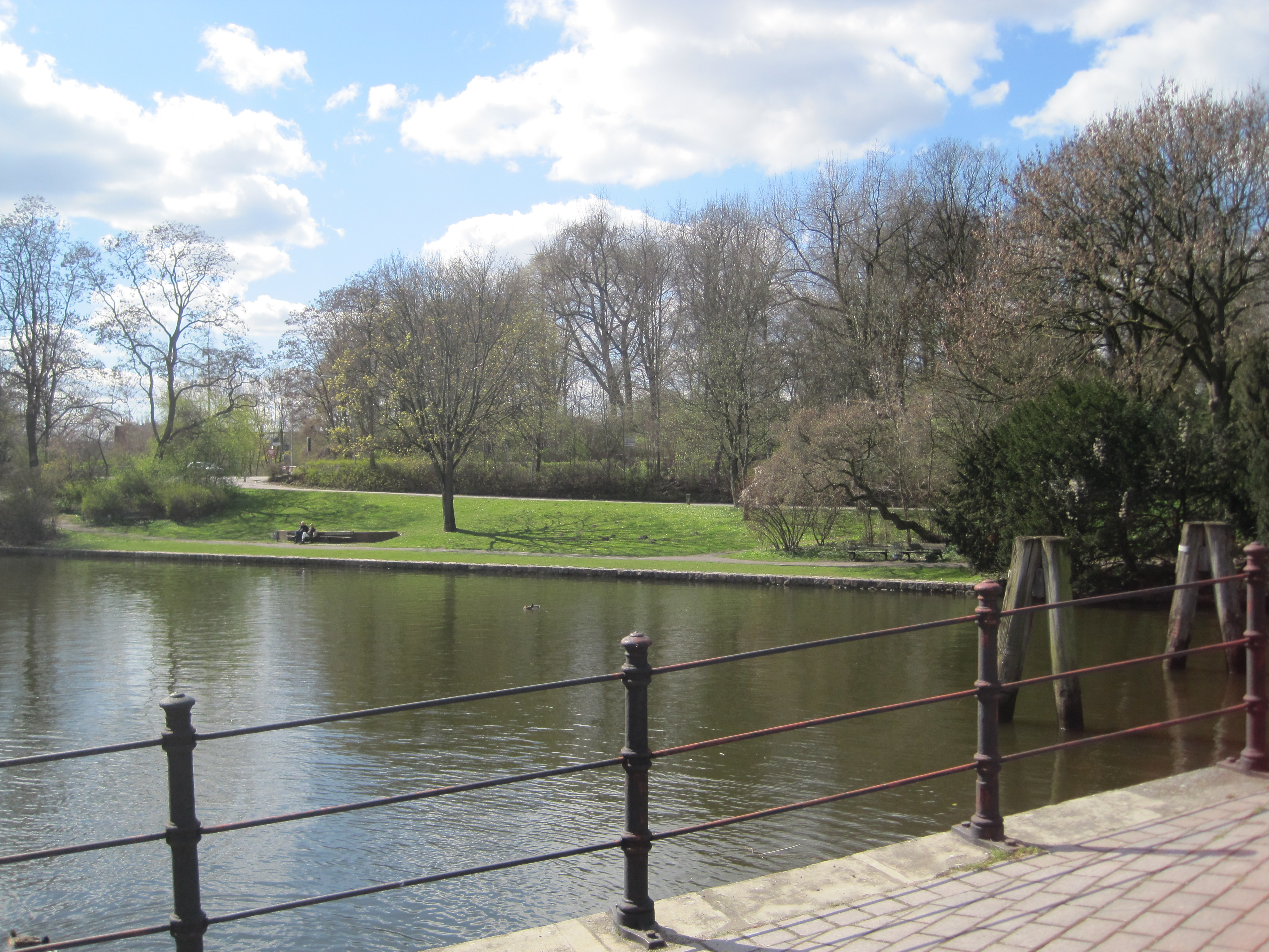 Der Malerwinkel in Lübeck, eine kleine Grünanlage westlich der Obertrave in den Lübecker Wallanlagen an der (Nördlichen) Wallstraße, hier von der Straße An der Obertrave auf Höhe der Einmündung der Dankwartsgrube gesehen.